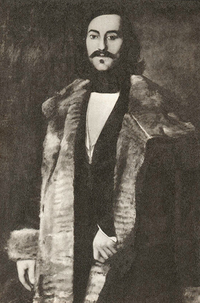 George Stephens (1813-1895)